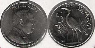 5 tambala 1995